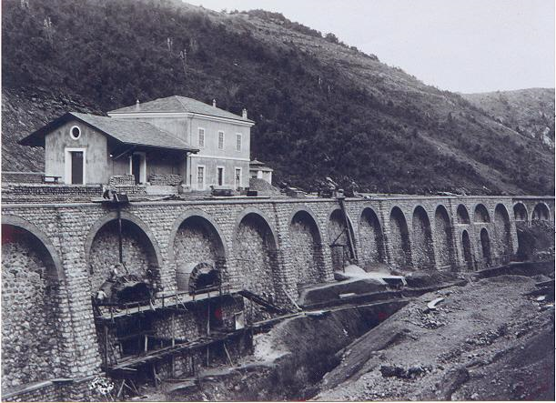 Eindrucksvolle Stützmauer des Bahnhofs Lauria kurz vor der Fertigstellung